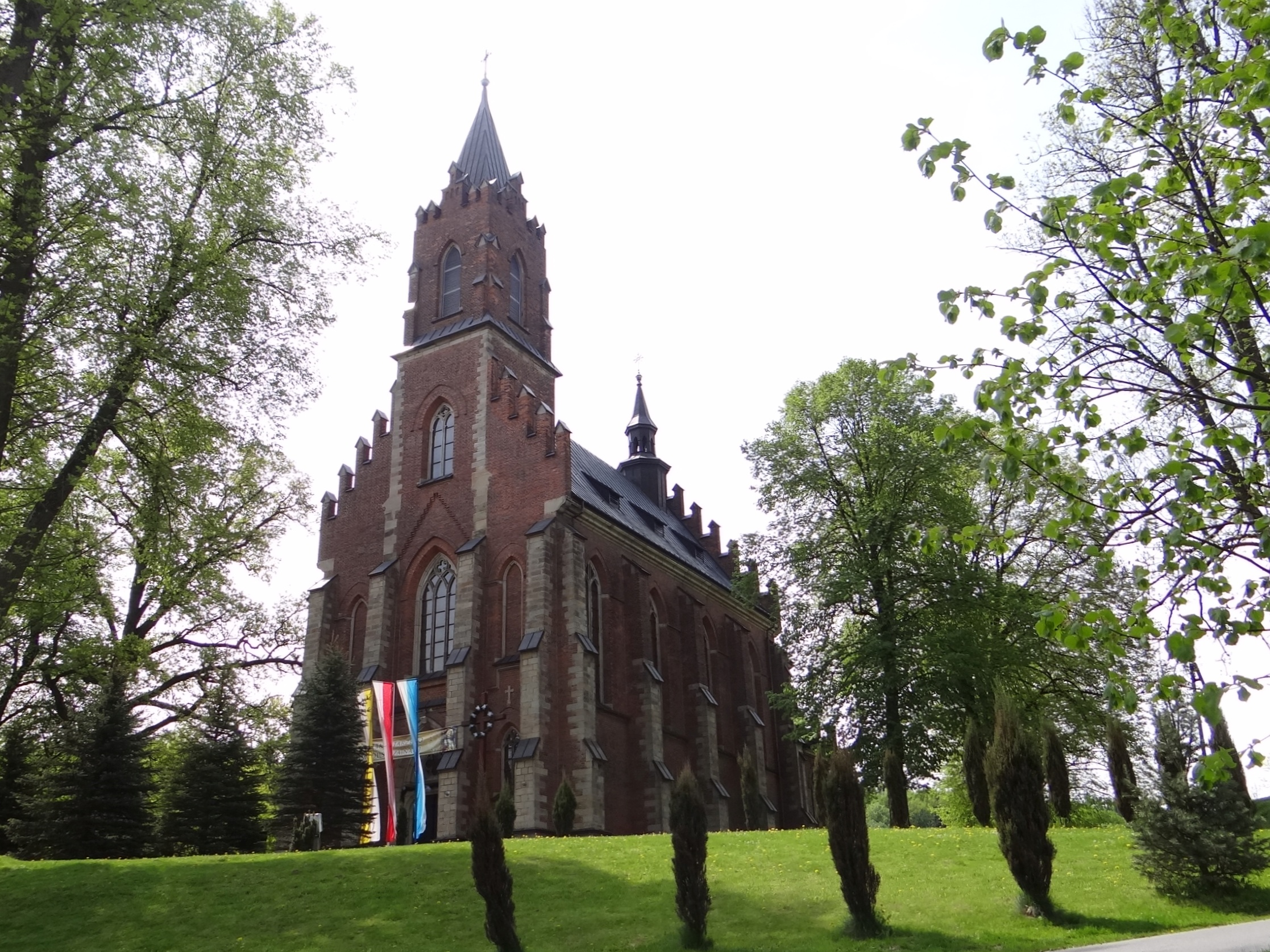 Gwoździec - rzymskokatolicki kościół parafialny pw. św. Katarzyny, 1904-1913